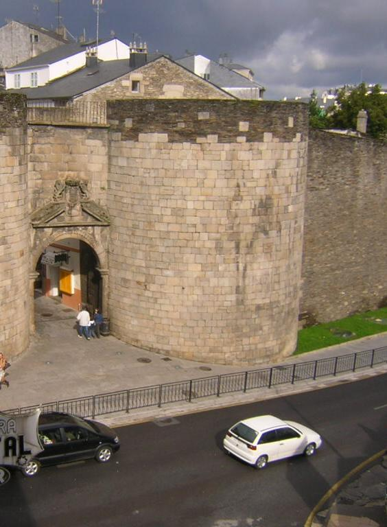 (Comunica Campo Castillo - c/San Pedro, con c/San Roque - Ronda de la Muralla)